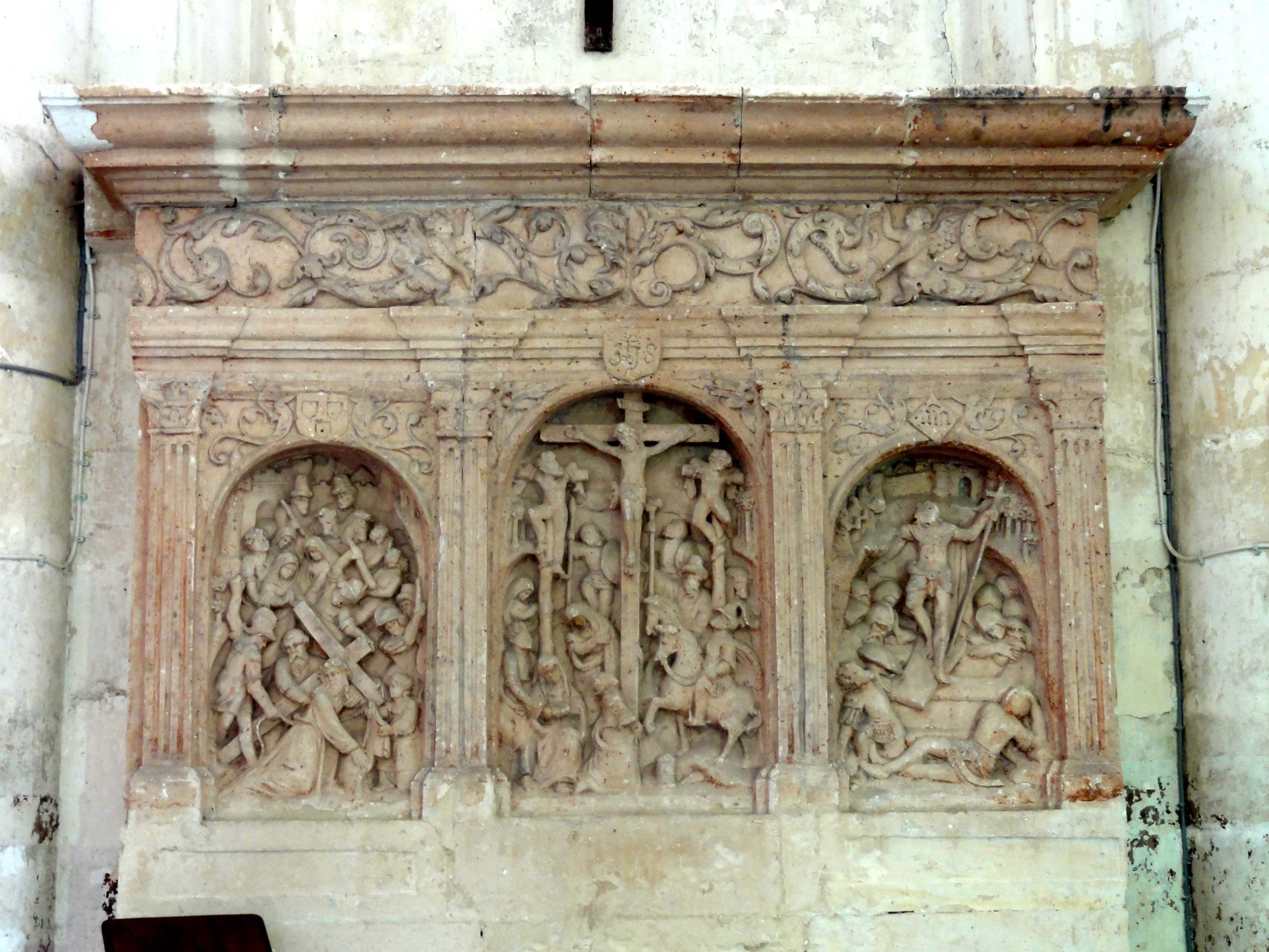 Retable.